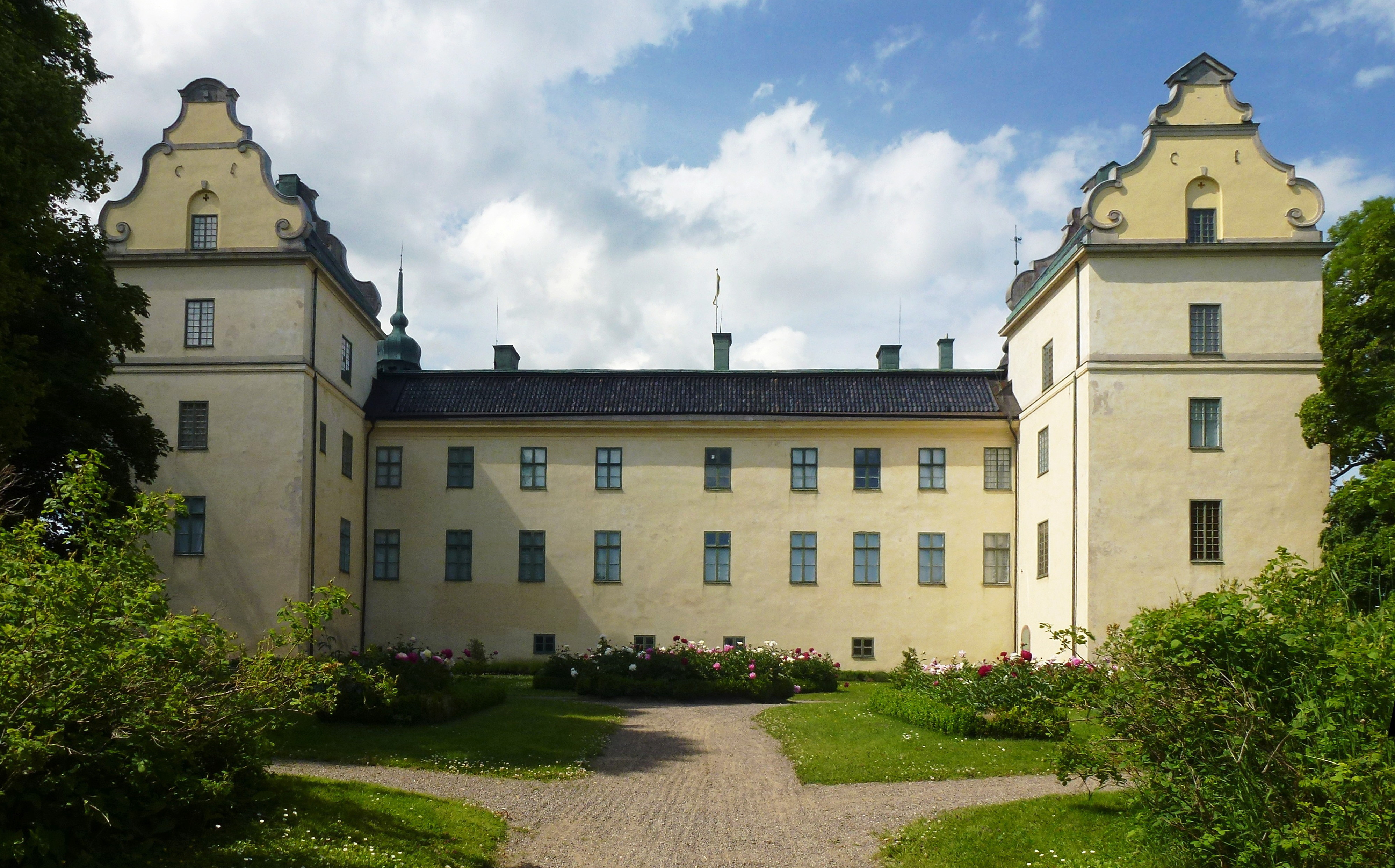 Tyresö slott sjösida